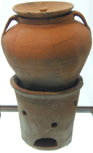 Marmita (olla de barro) con tapadera sobre un anafre o anafe (hornillo de brasas). Alfarería medieval andalusí, hacia el siglo X, en el Museo de Medina-Azahara (Córdoba, España)